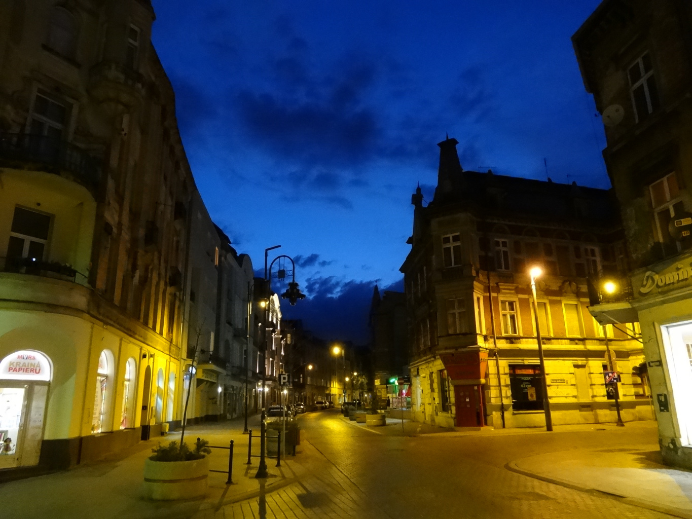 Ulica Dworcowa w Bydgoszczy